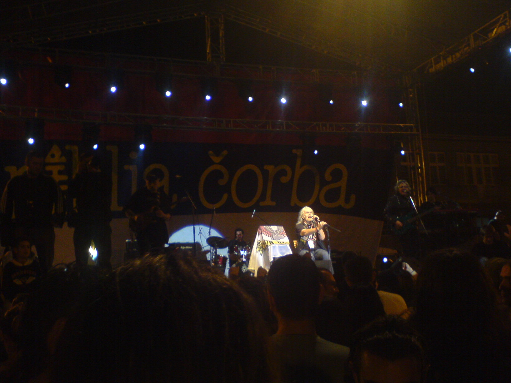 Riblja Čorba performing live in Kosovska Mitrovica in 2007